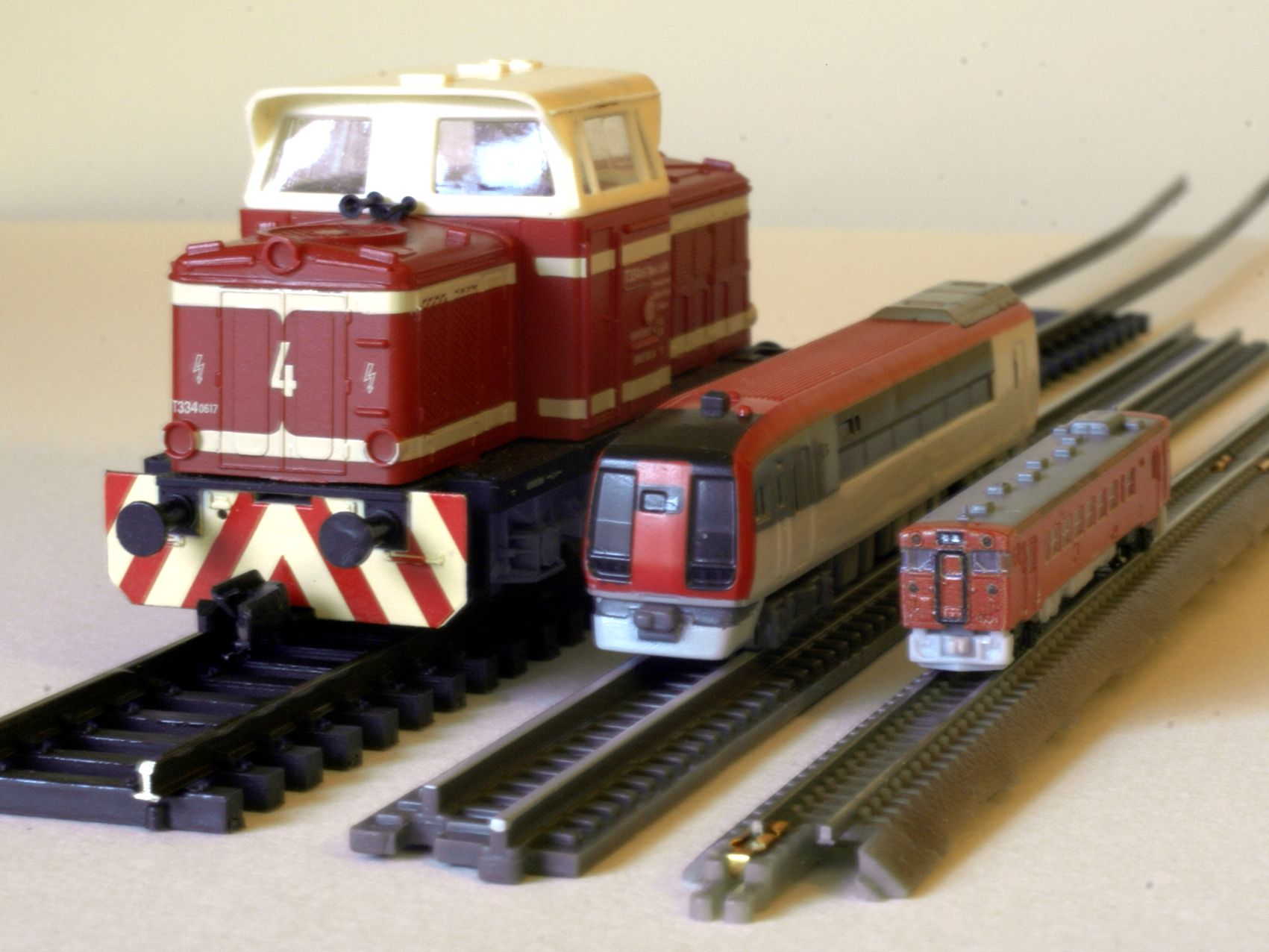 Vergleich der Modellbahnspuren TT - ZZ - T